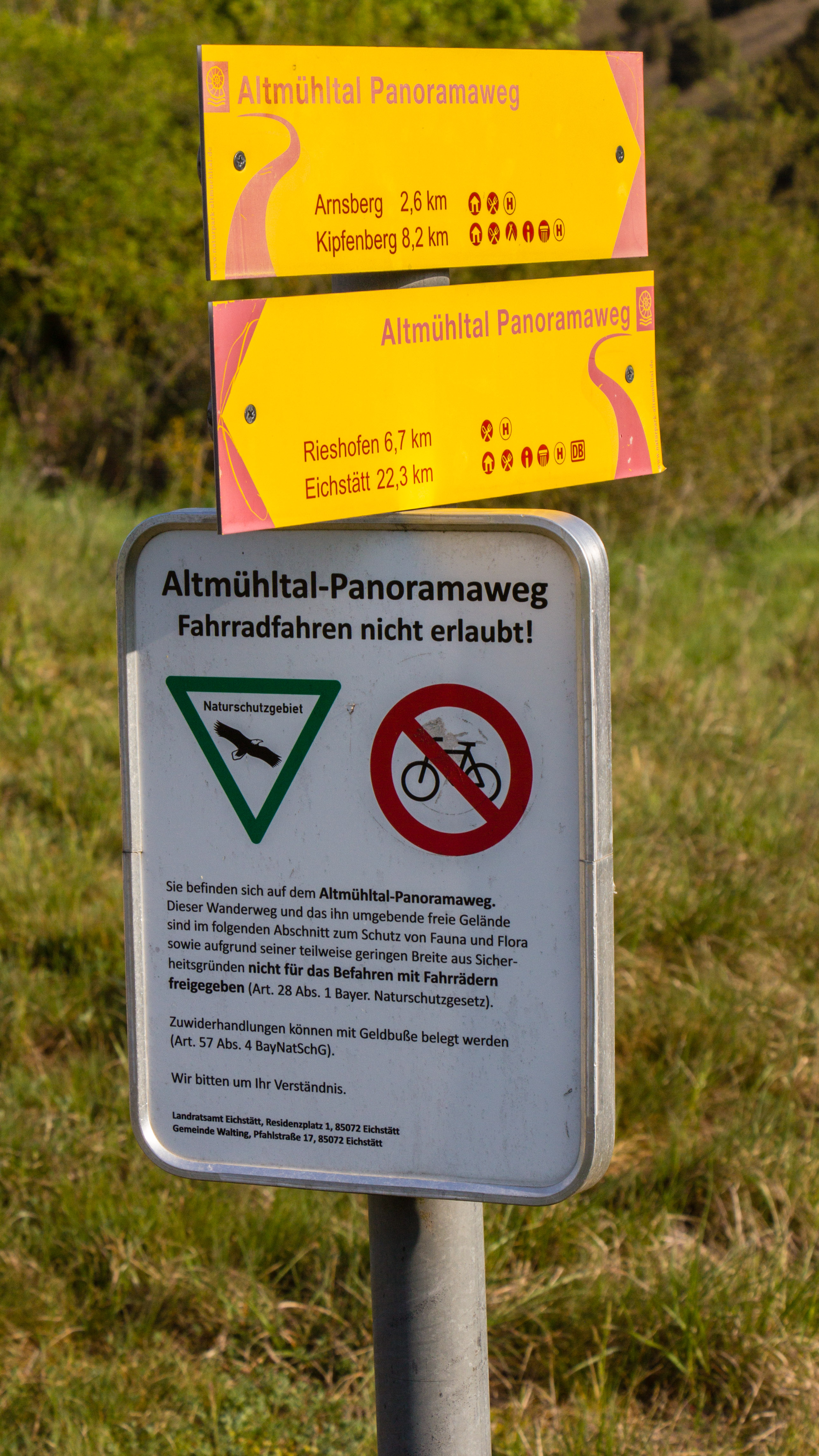 Naturschutzgebiet Gungoldinger Wacholderheide, Sich von Gungolding nach Norden